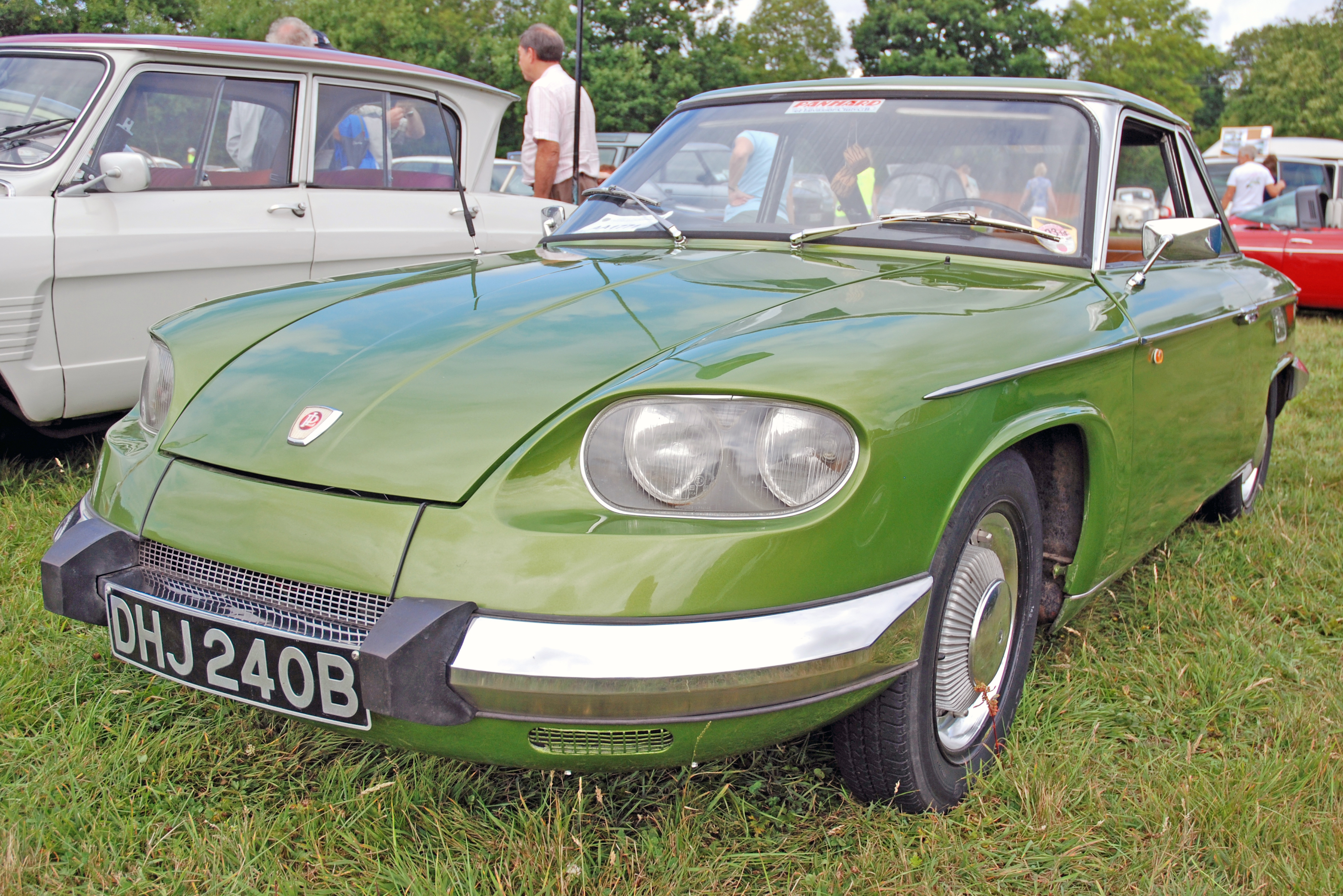 Aug 2013